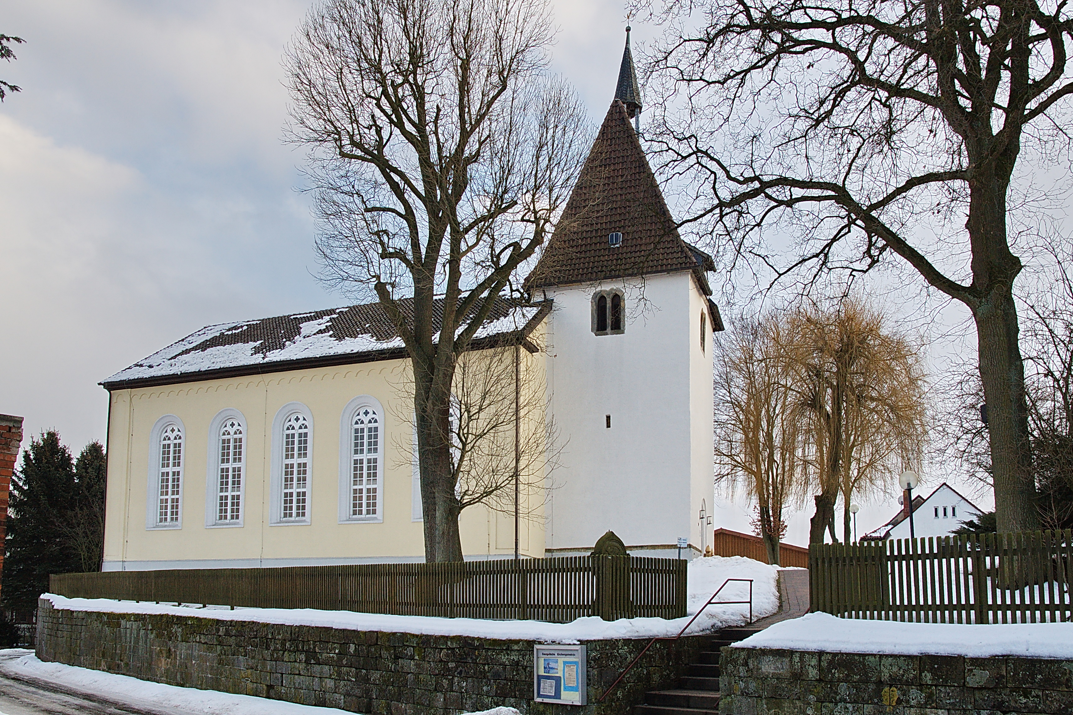 St.-Martins-Kirche in Hachmühlen (Bad Münder), Niedersachsen, Deutschland